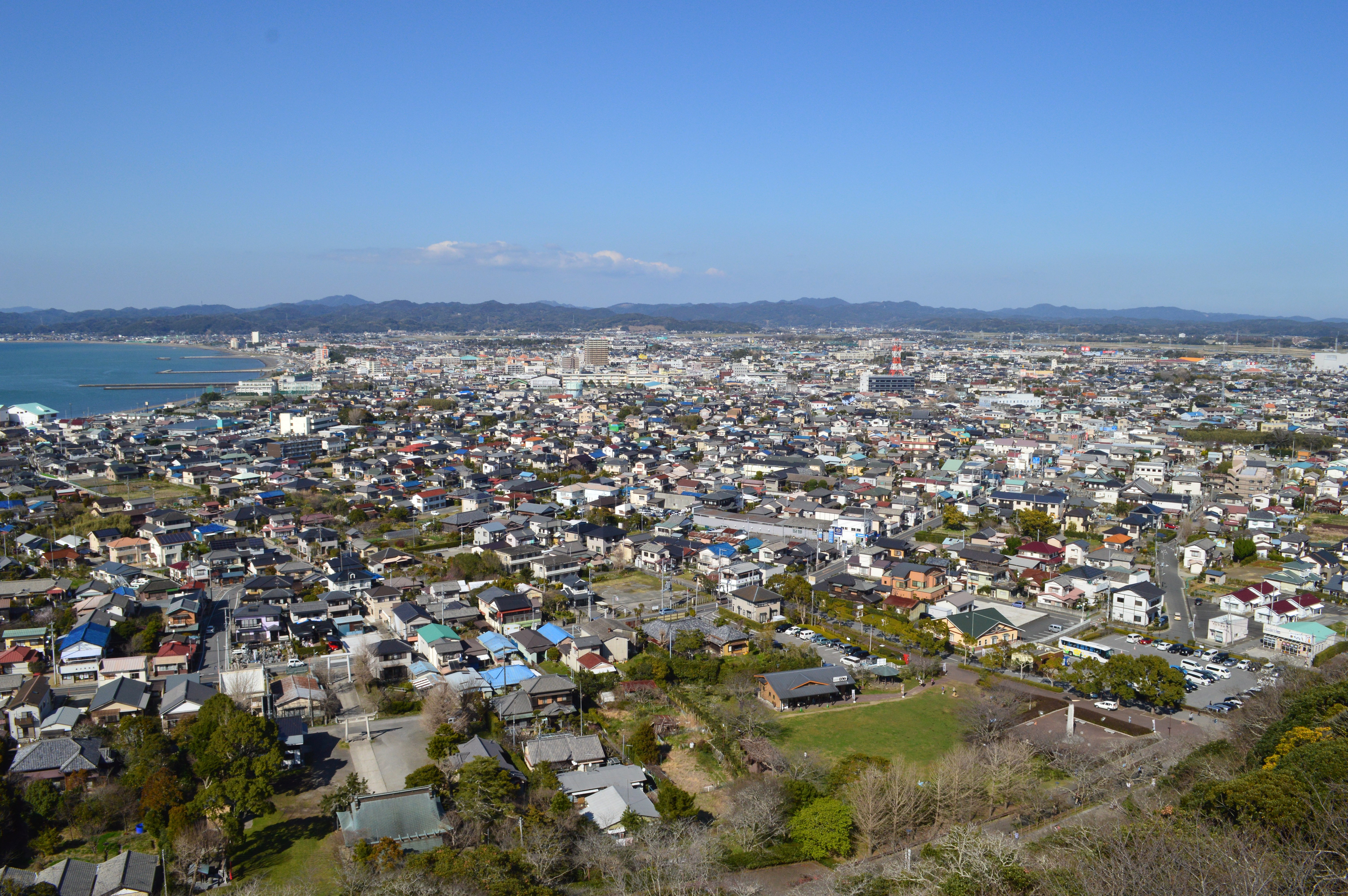 館山城から望む館山市街地